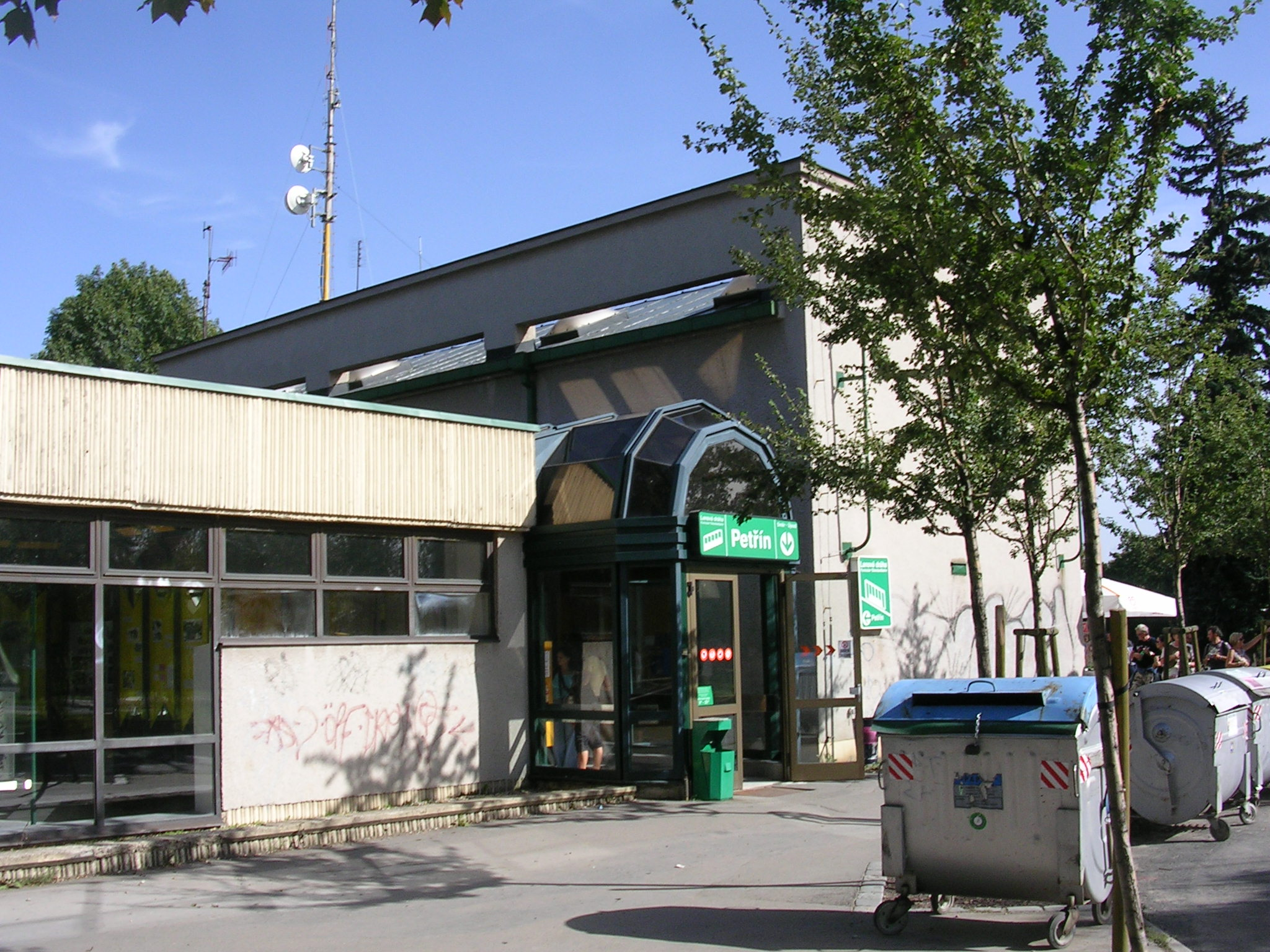 Praha, lanová dráha na Petřín, vstupní část budovy stanice Petřín